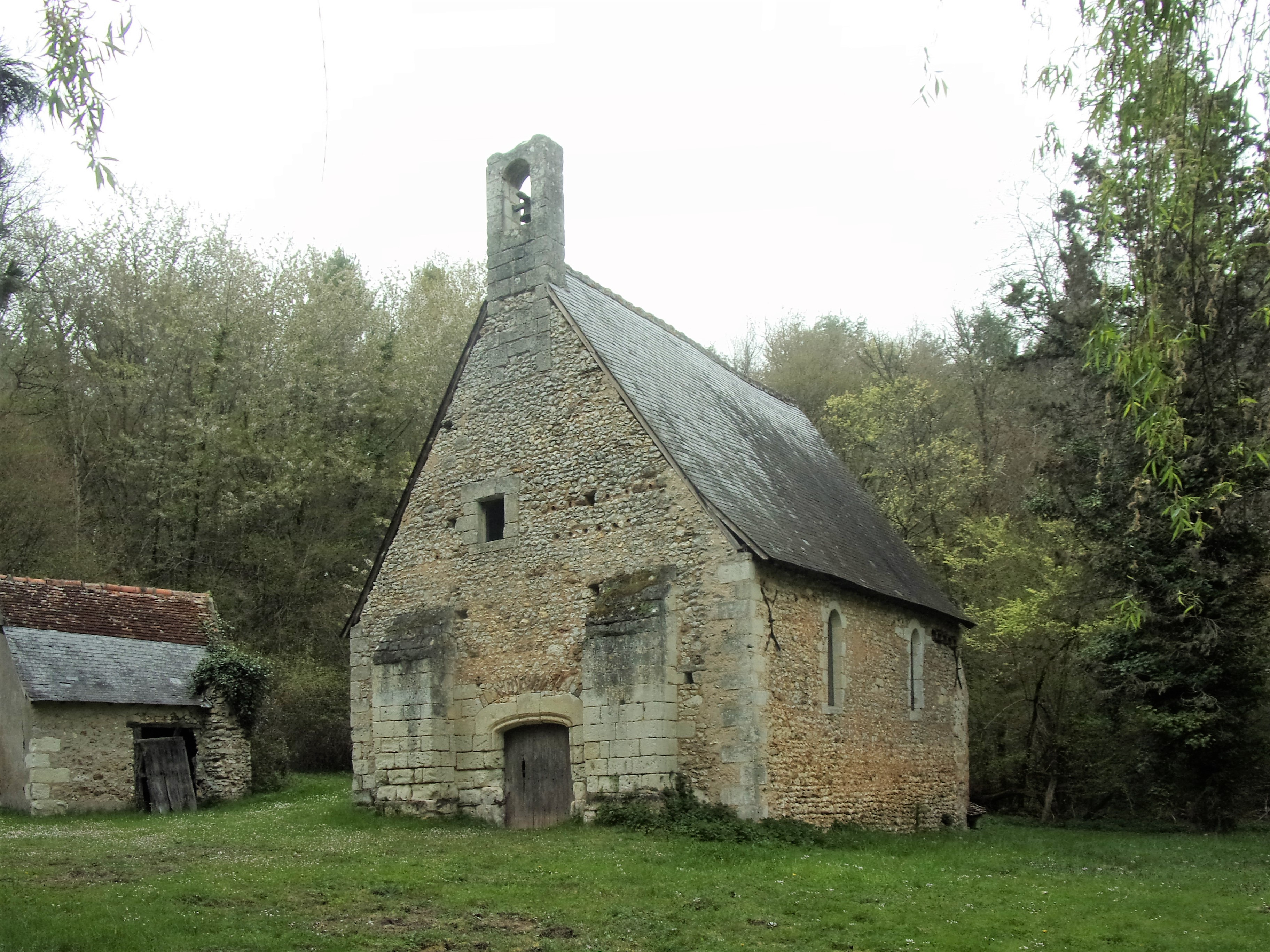 Vue générale de la chapelle Saint-Laurent de Veigné